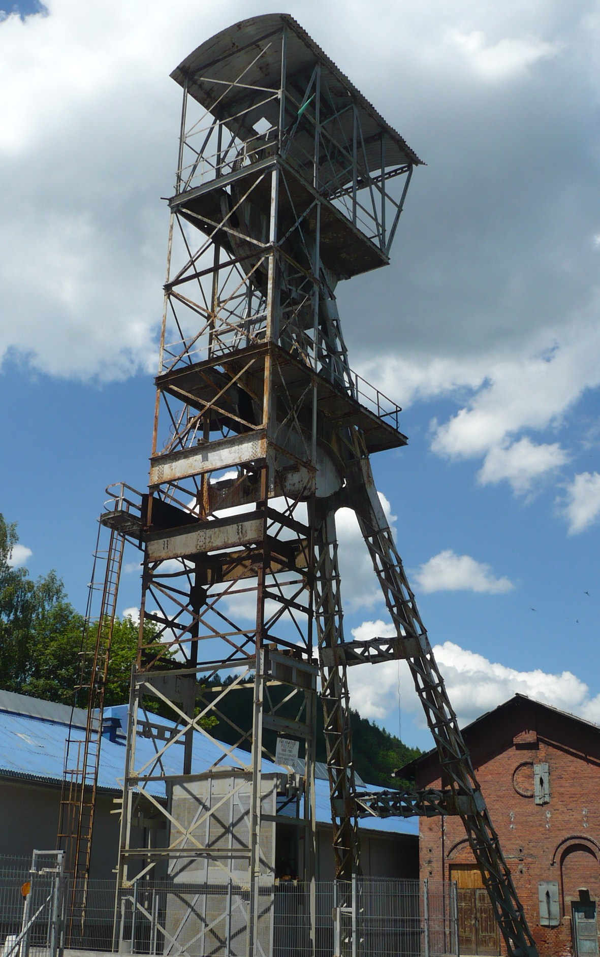 Nowa Ruda, szyb „Lech""